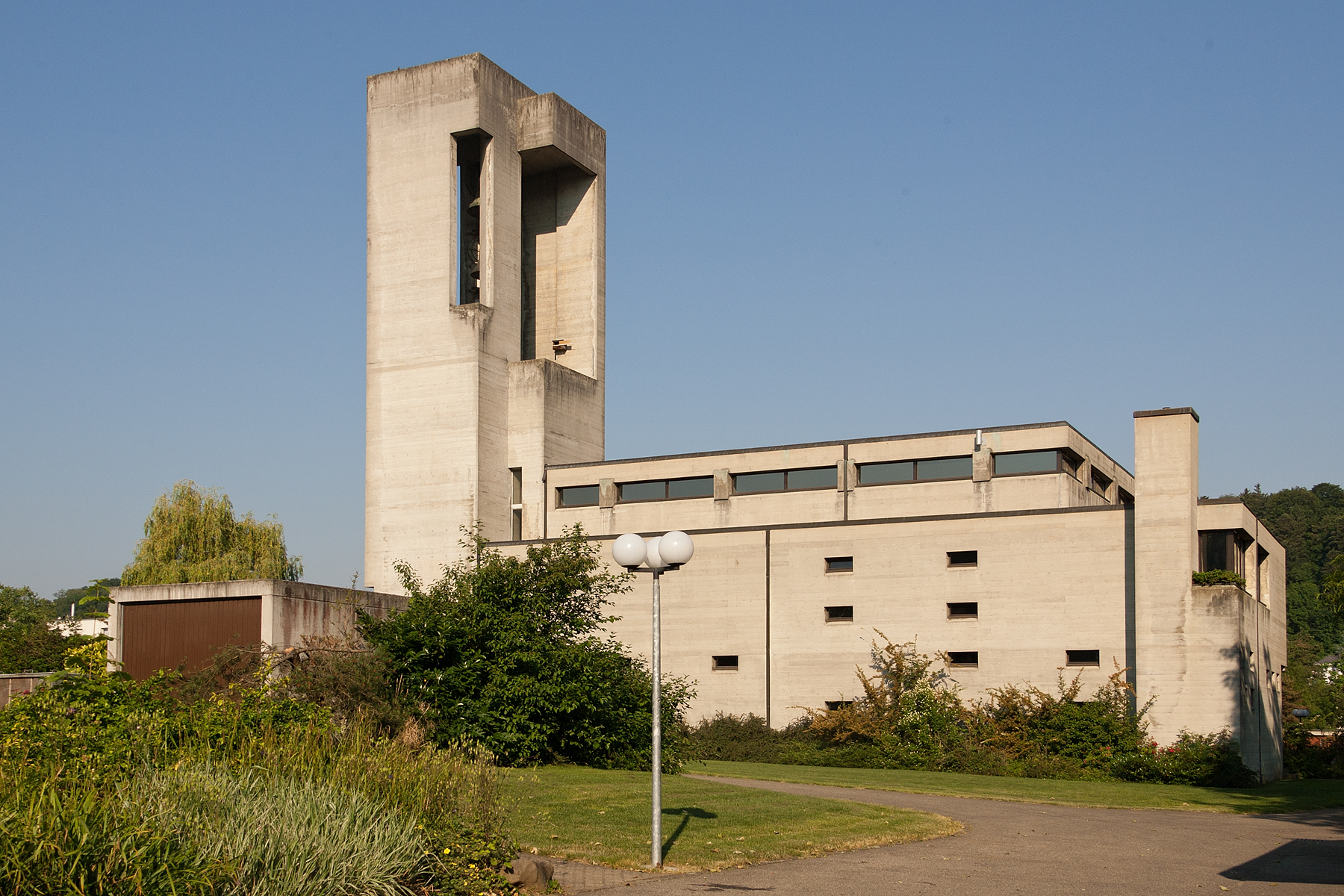 Reformierte Pfarrkirche in Reinach (BL)